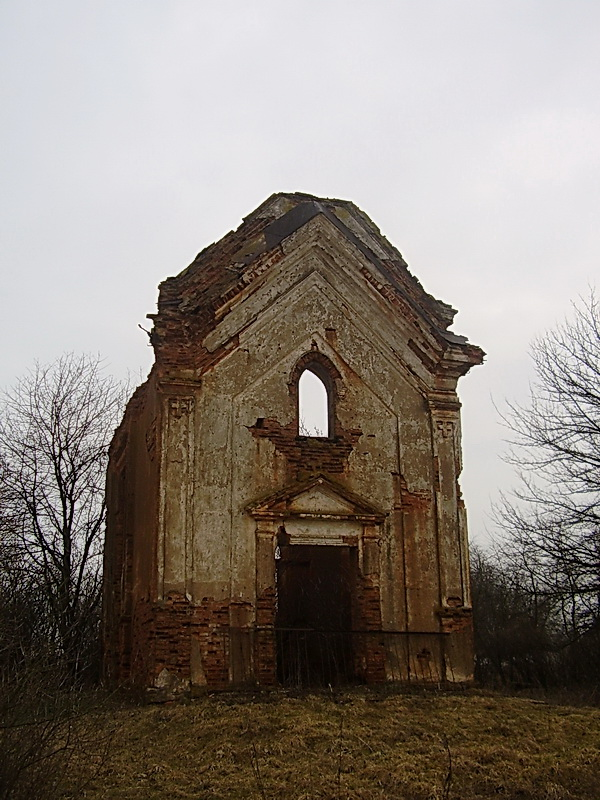 Прасці. Руіны капліцы